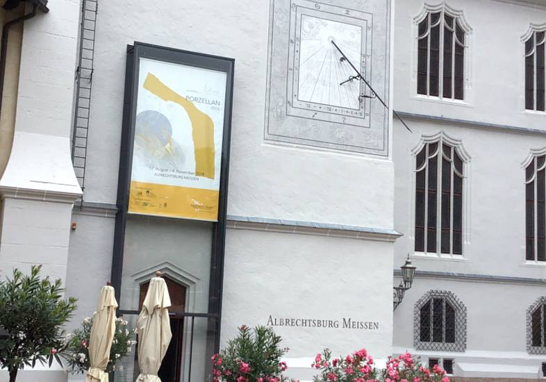 Eingang Albrechtsburg Meissen mit Biennalebanner